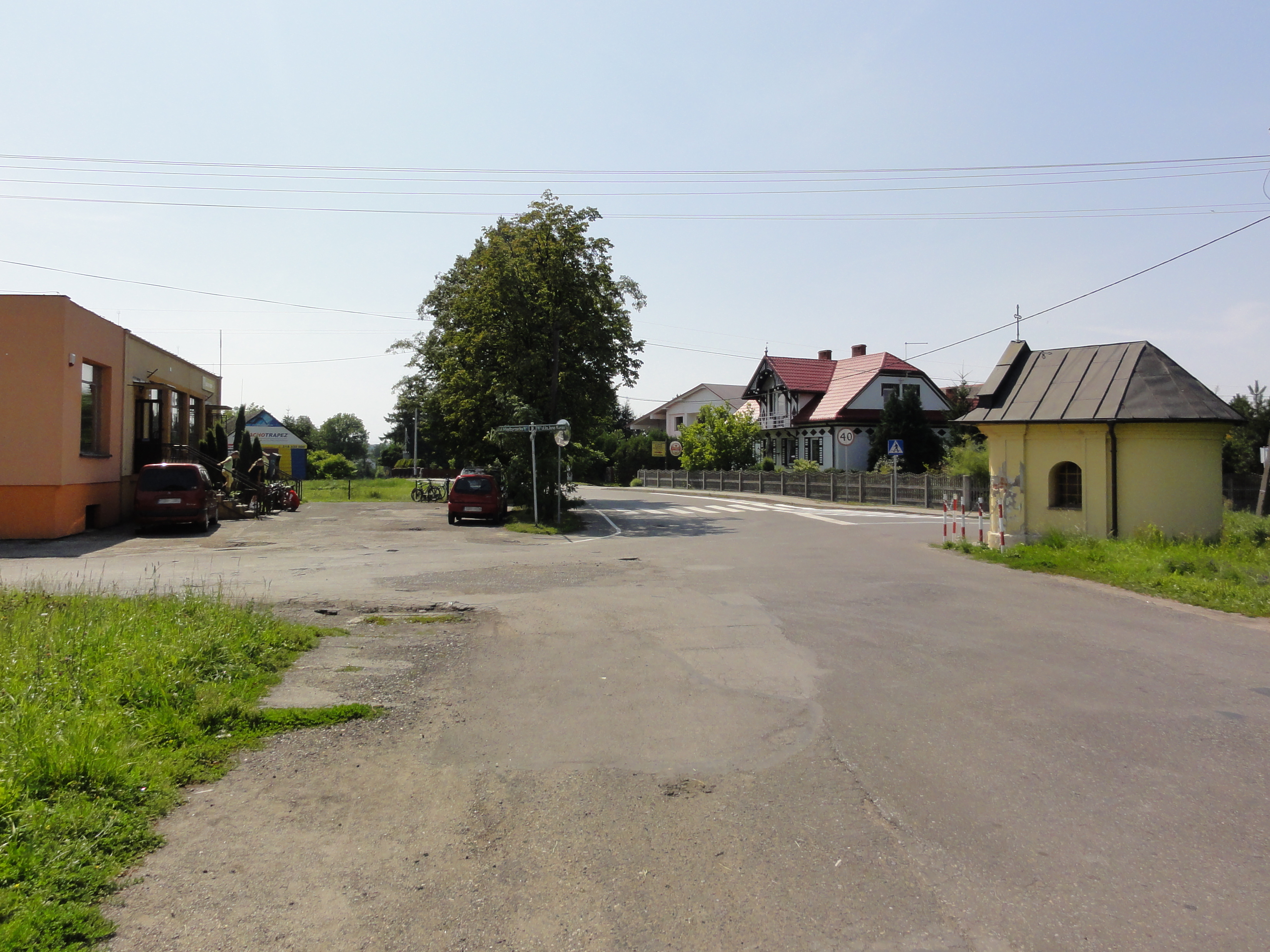 Główne skrzyżowanie w Bronowie